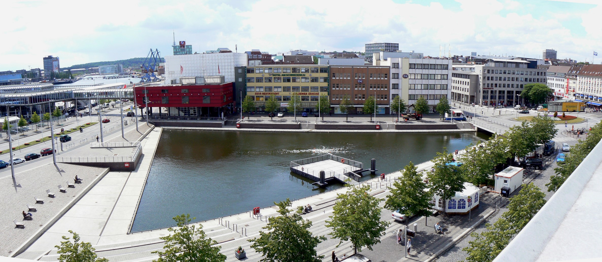 Blick auf den Bootshafen in Kiel. Panorama aus 3 Einzelbildern.